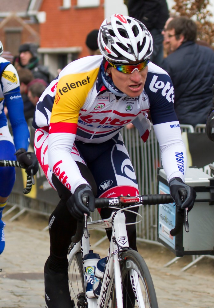 190 de vreese greipel